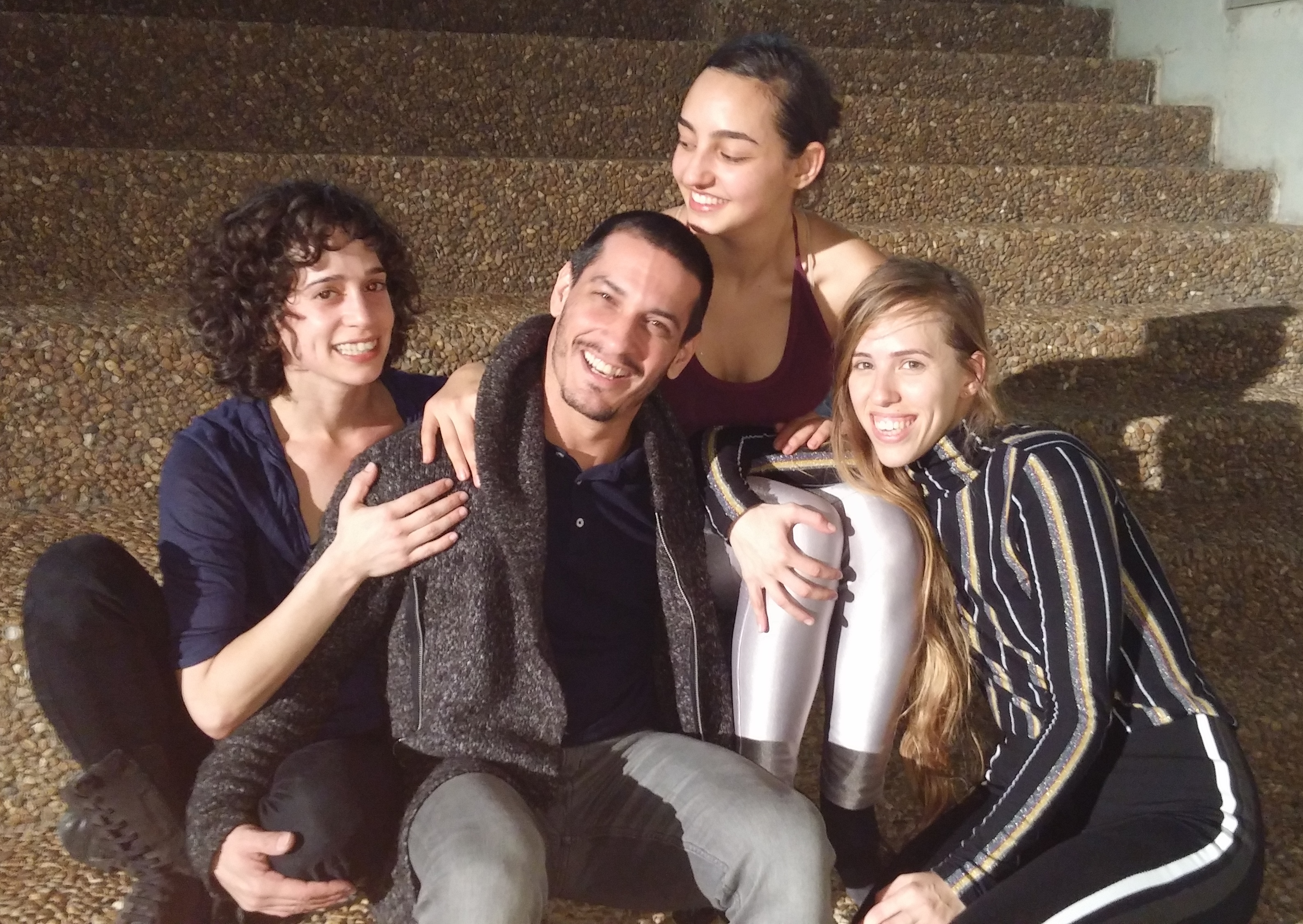 עידן שרעבי ורקדניות 2